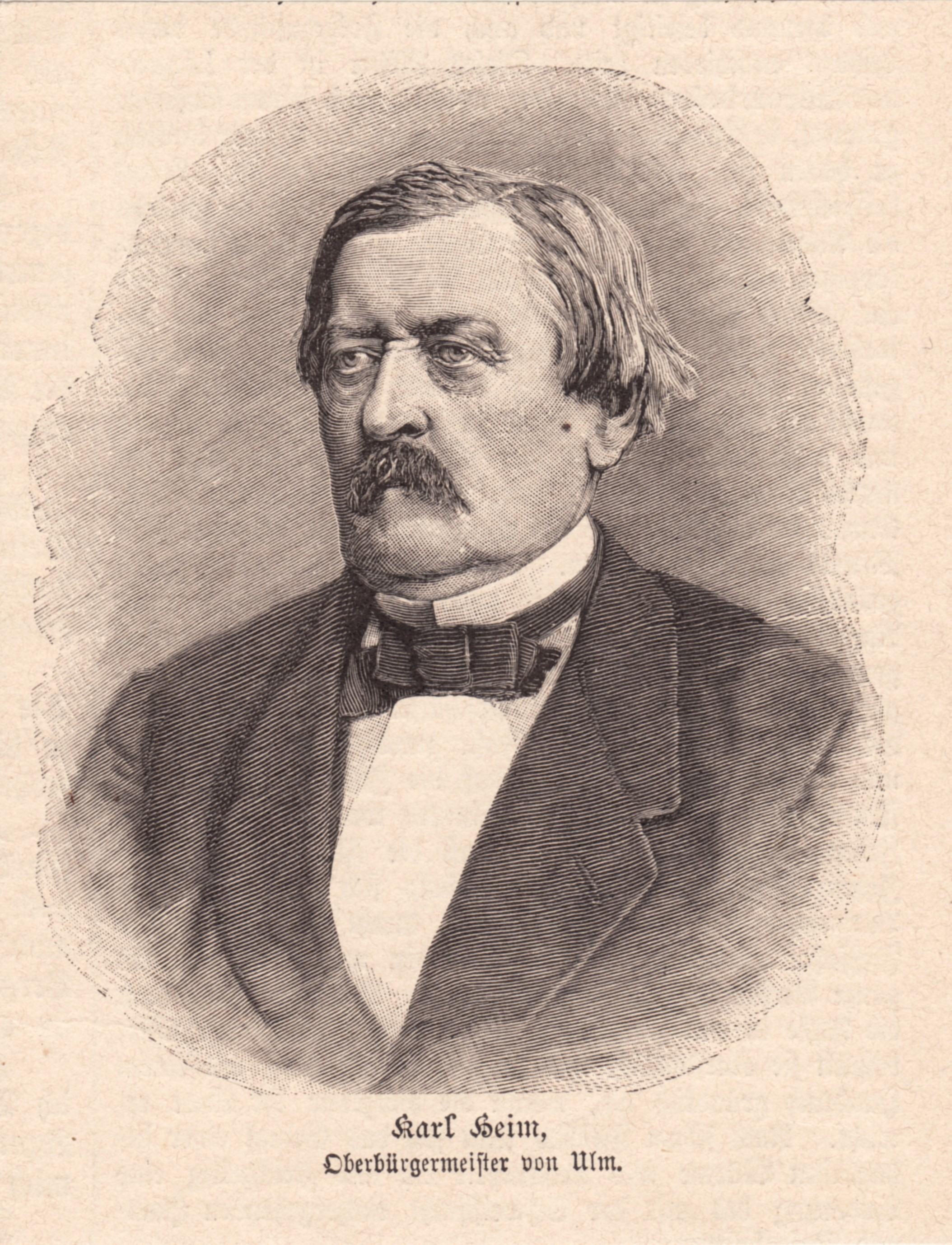 Karl Heim, bzw. Carl von Heim, Oberbürgermeister von Ulm a. d. Donau